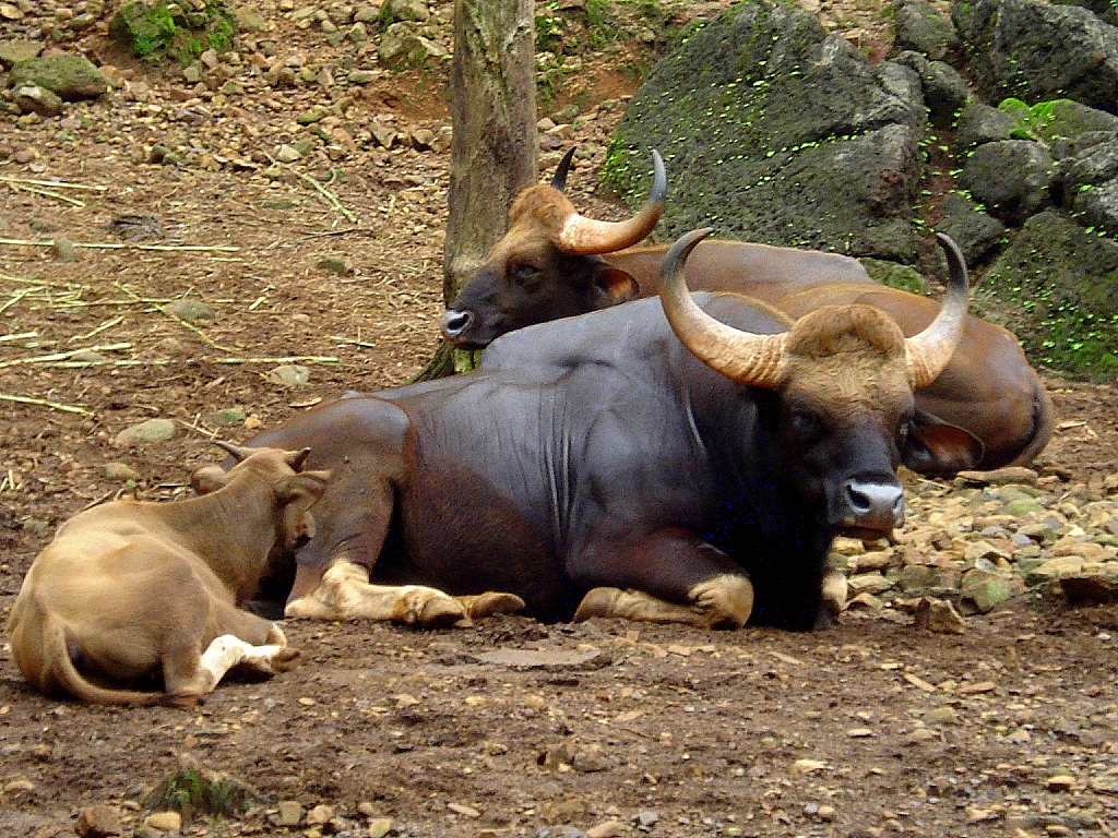 Gaur or Indian Bison. shot at Bondla wild life sanctuary, Goa